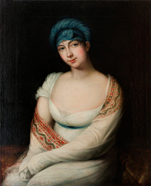 Мария (Мария-Юзефа) Федоровна Уварова (1773-1810), известная красавица, жена Федора Петровича Уварова, дочь генерала российской службы Каспра Любомирского. В первом браке была за Петром Потоцким, во 2-м за графом В.А.Зубовым.